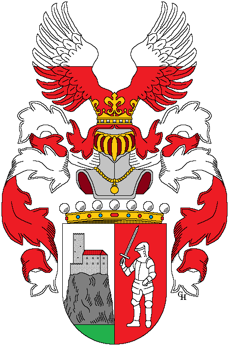 Wappen des Karl Martin Werkmann (1878–1952), enger Mitarbeiter von Kaiser Karl I., verliehen anlässlich seiner Erhebung in den österreichischen Freiherrenstand mit dem Prädikat "von Hohensalzburg" 1918. Zeichnung von Gerd Hruška ( Für weitere Informationen zu dieser Standeserhebung siehe (